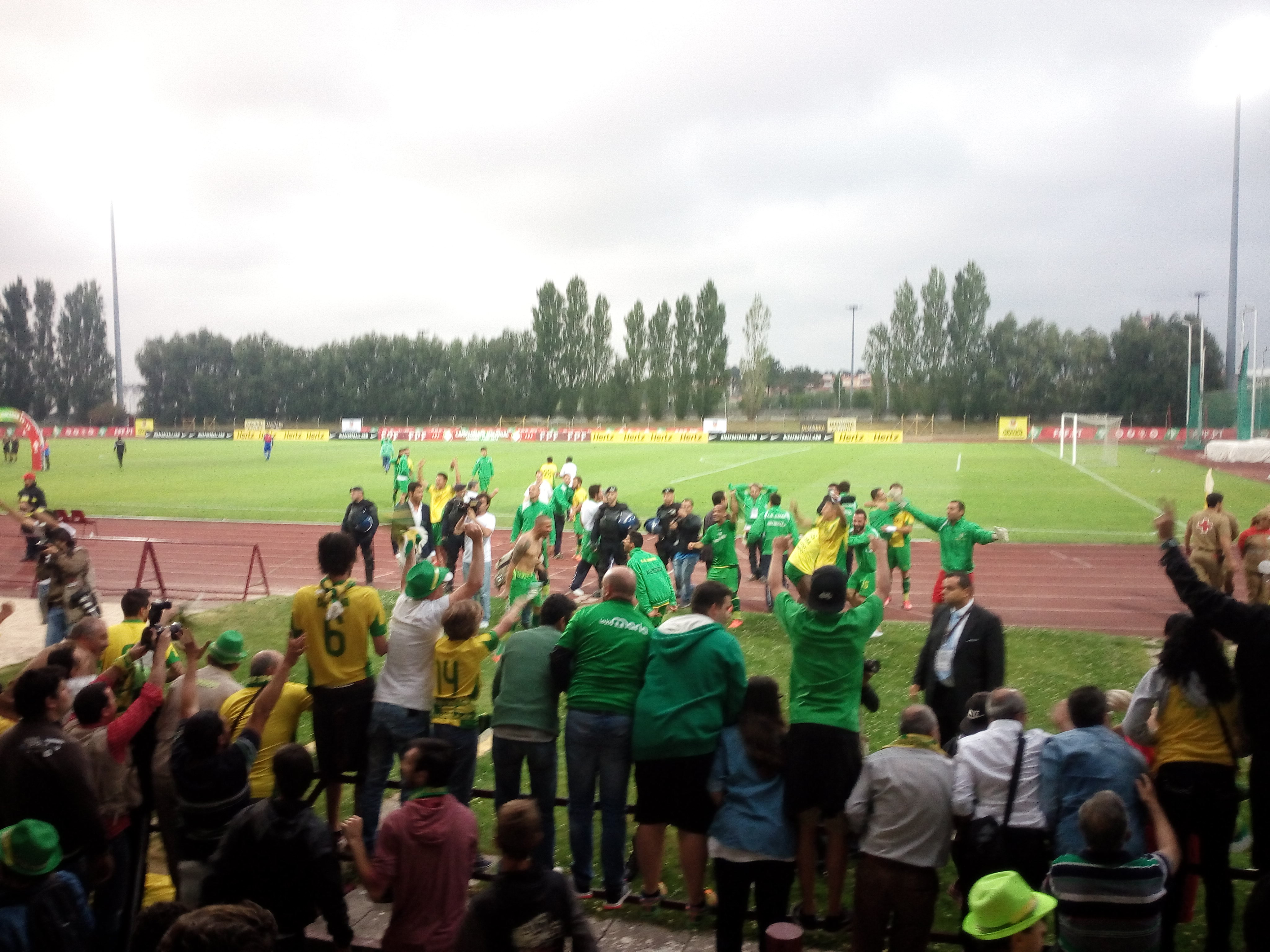 CD Mafra logo após conquistar o título do CNS 2014/15